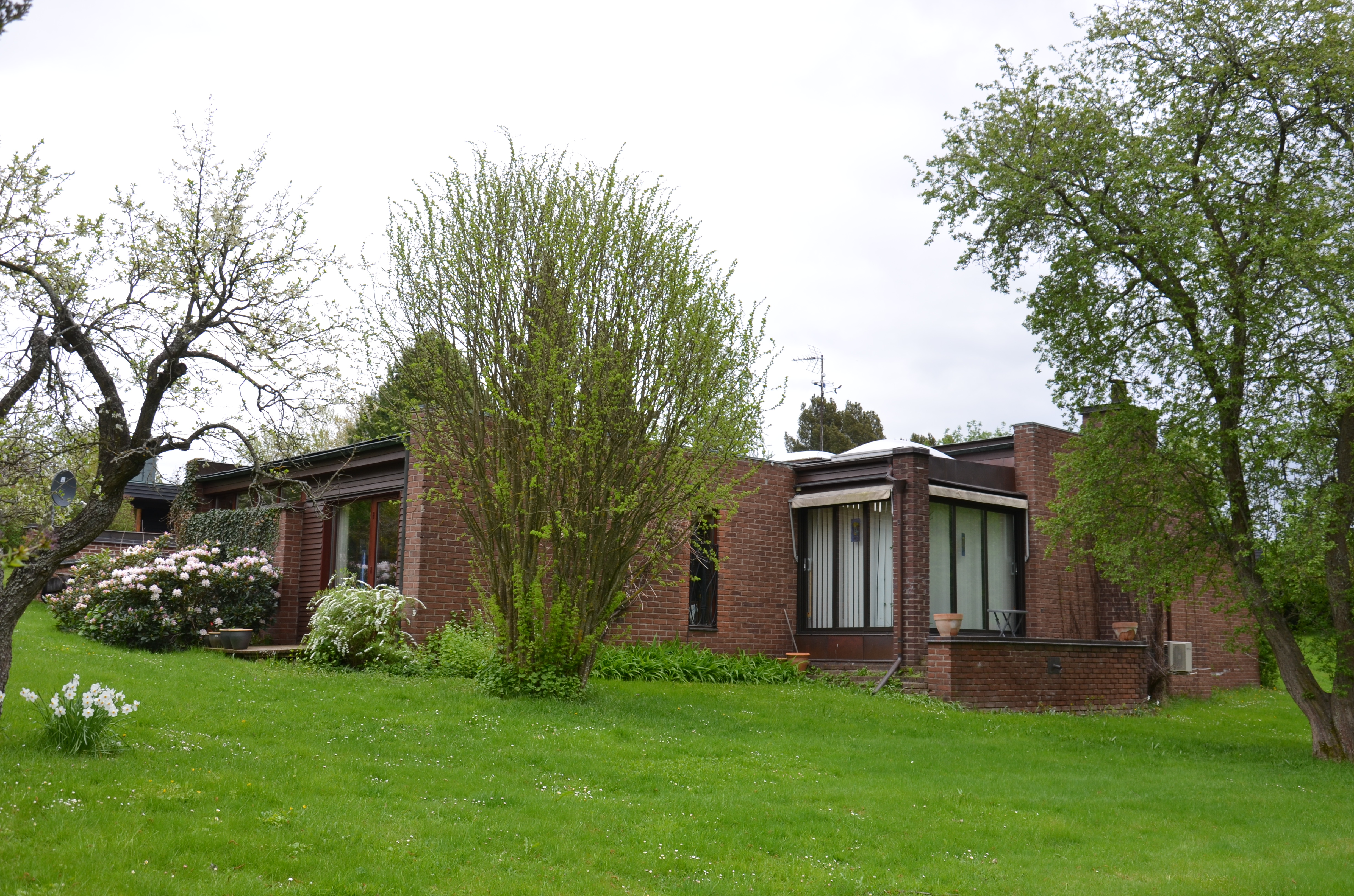 NU64 house, Nordengatan 17 in Norrköping. Architect: Lennart Kvarnström.